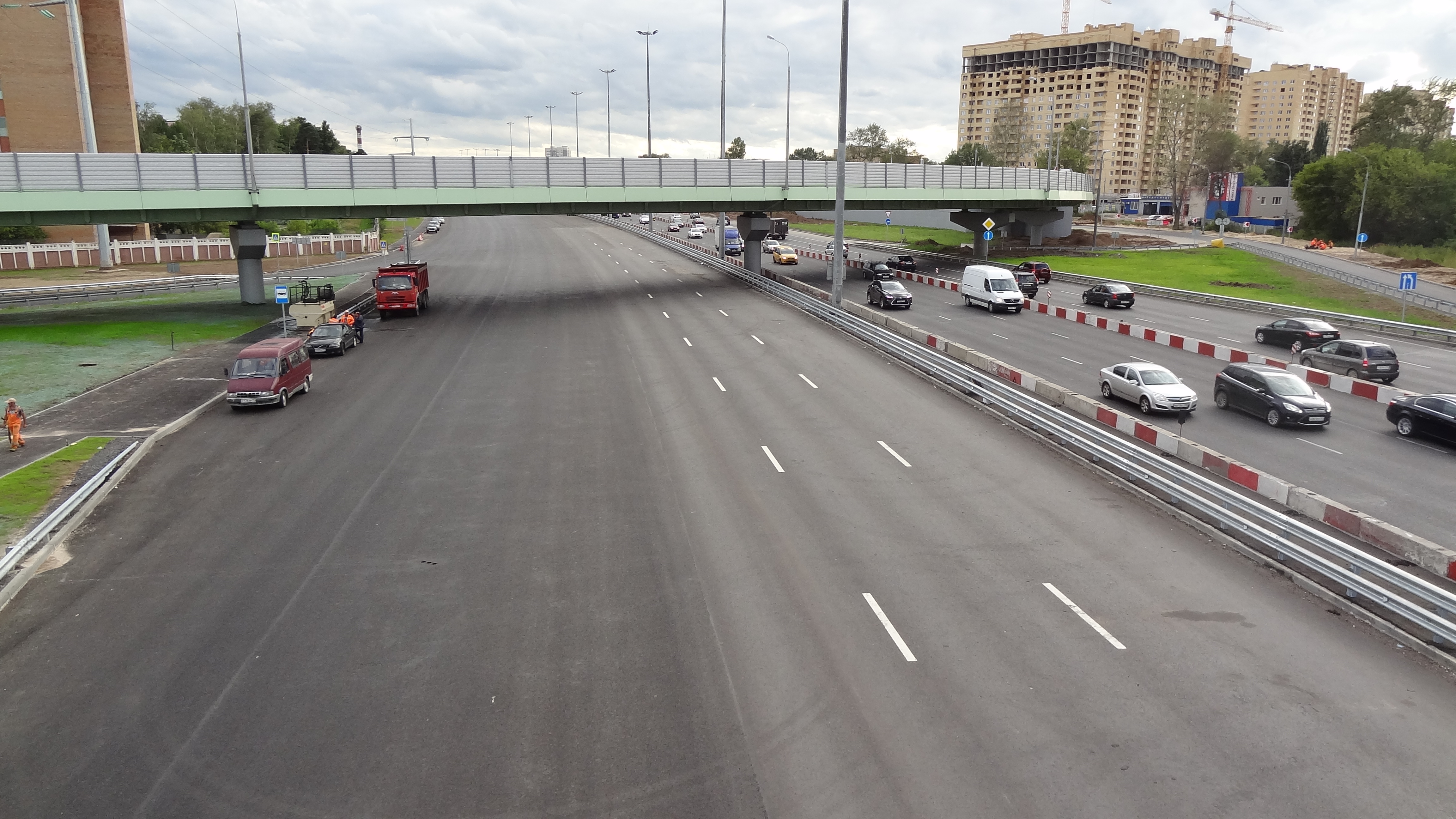 Реконструкция Ярославского шоссе в районе Болшевского шоссе